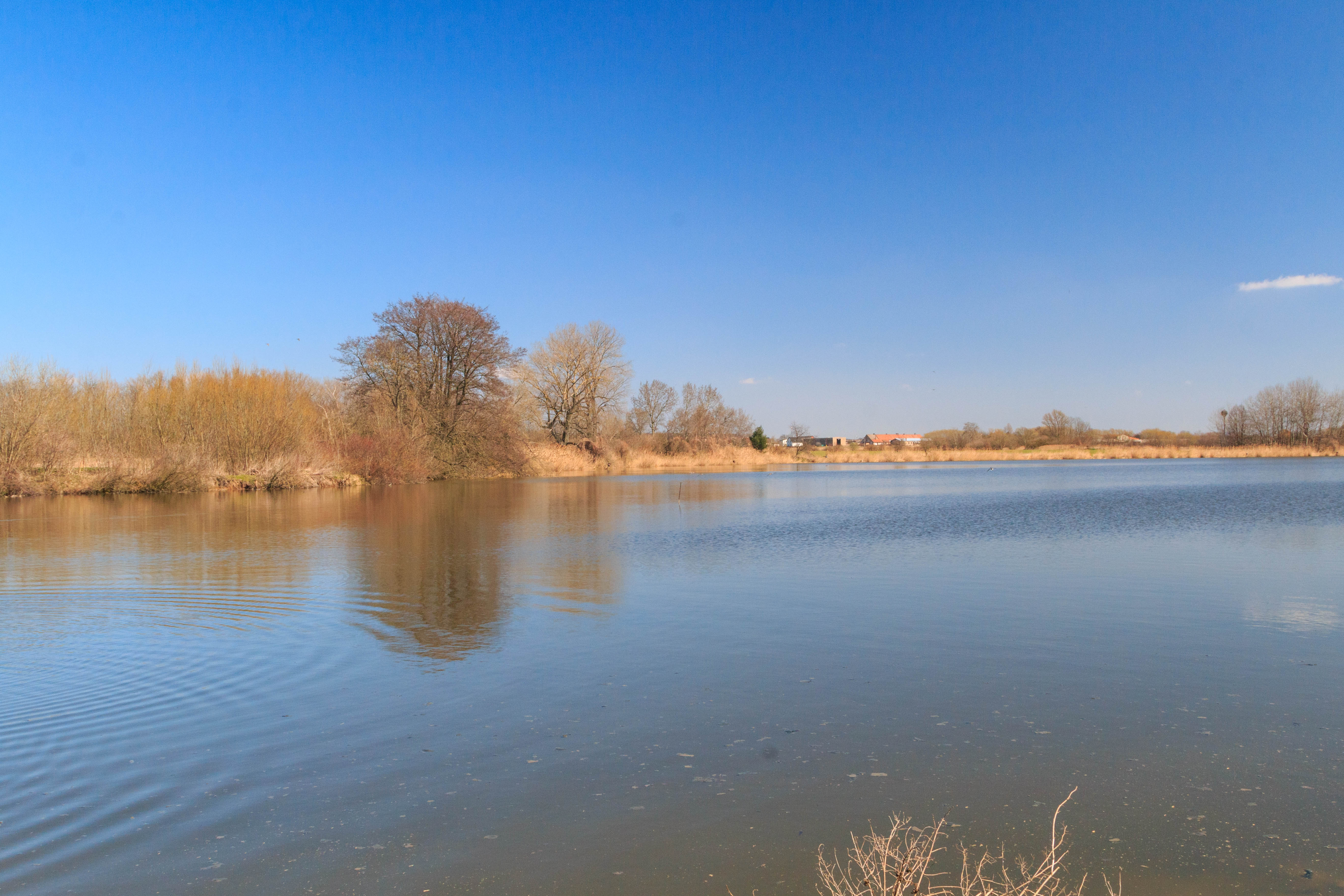 rybník Vondránek u obce Kosičky Project: Vodstvo.